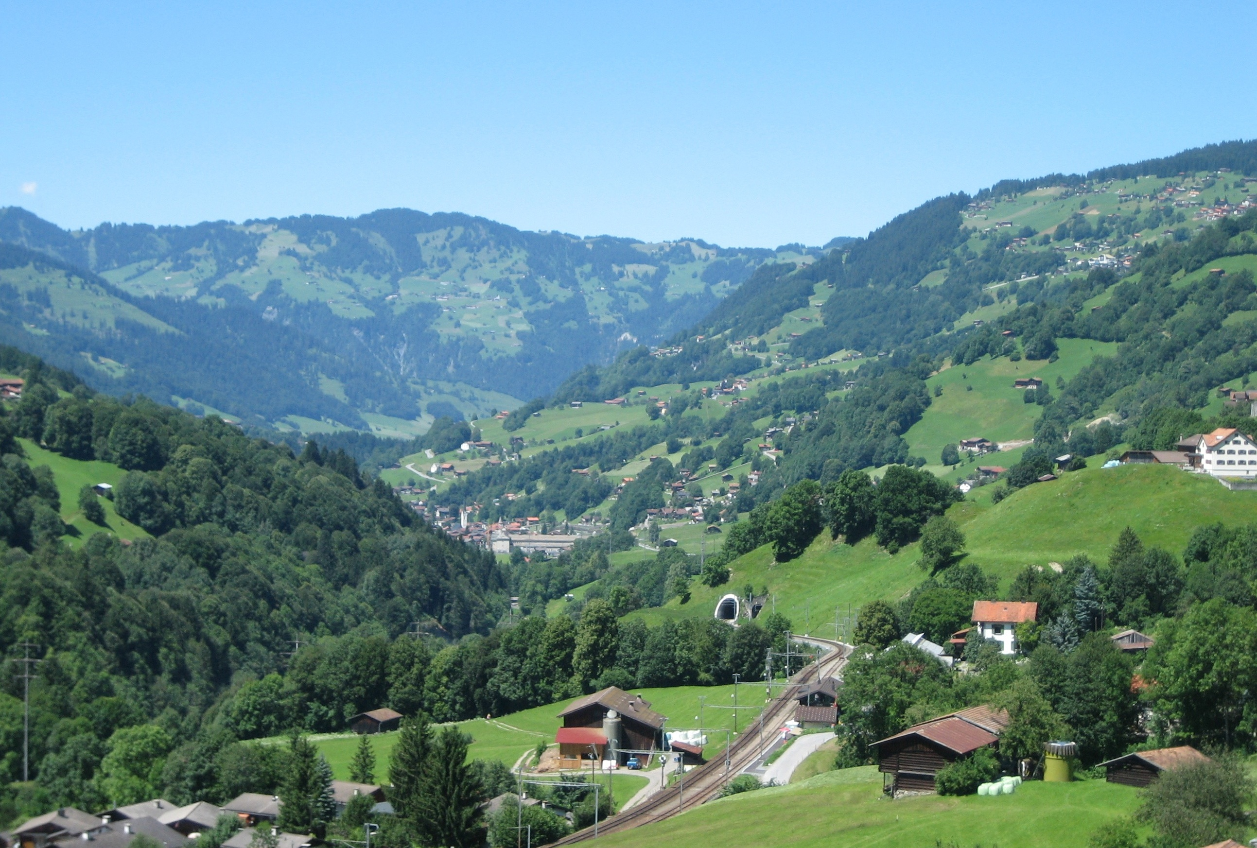 Prättigau Richtung Norden, in der Bildmitte Küblis